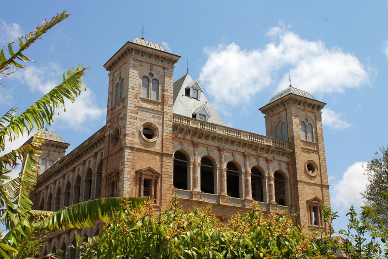 Antananarivo september 2015